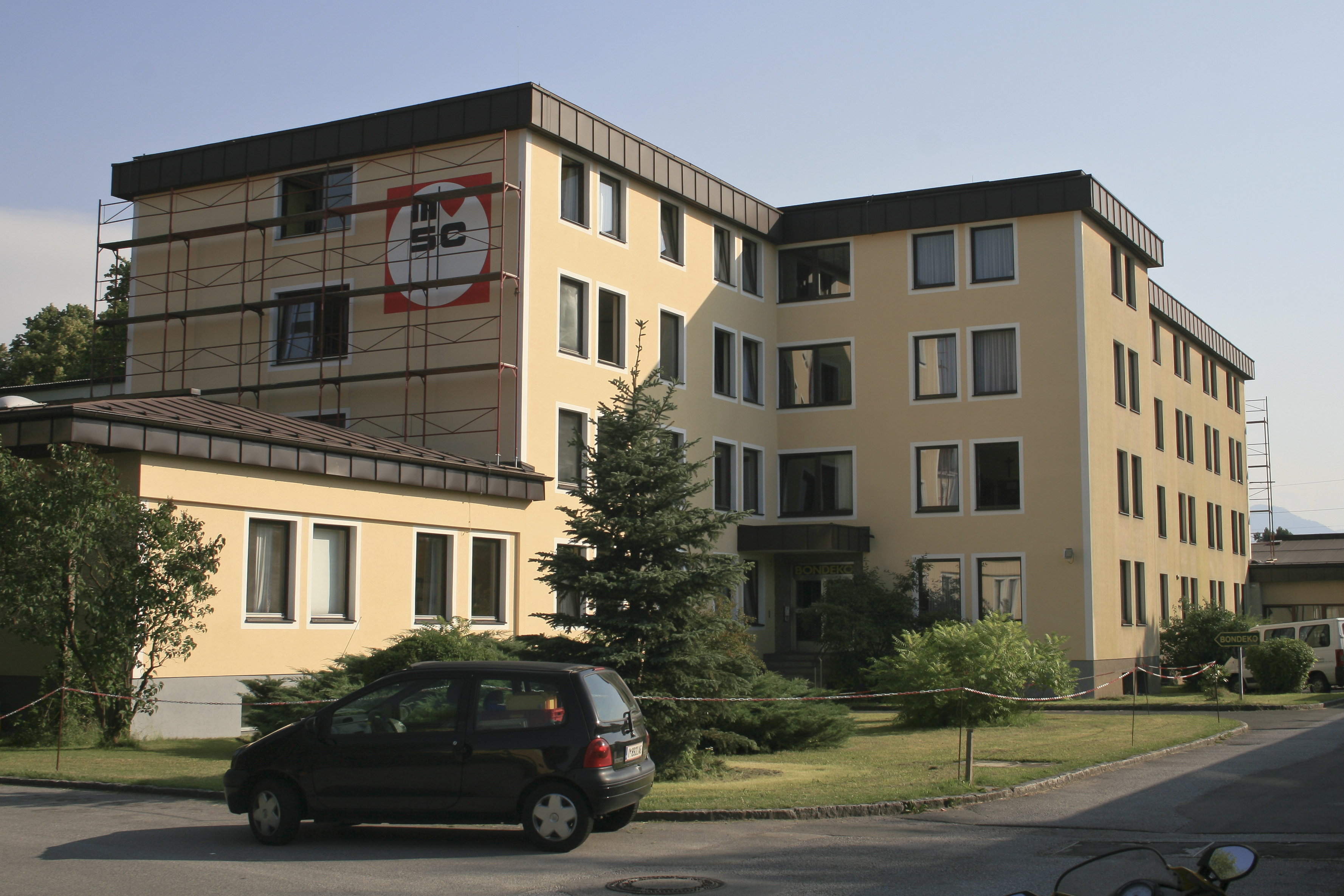 Provinzialat der Herz Jesu Missionare Salzburg